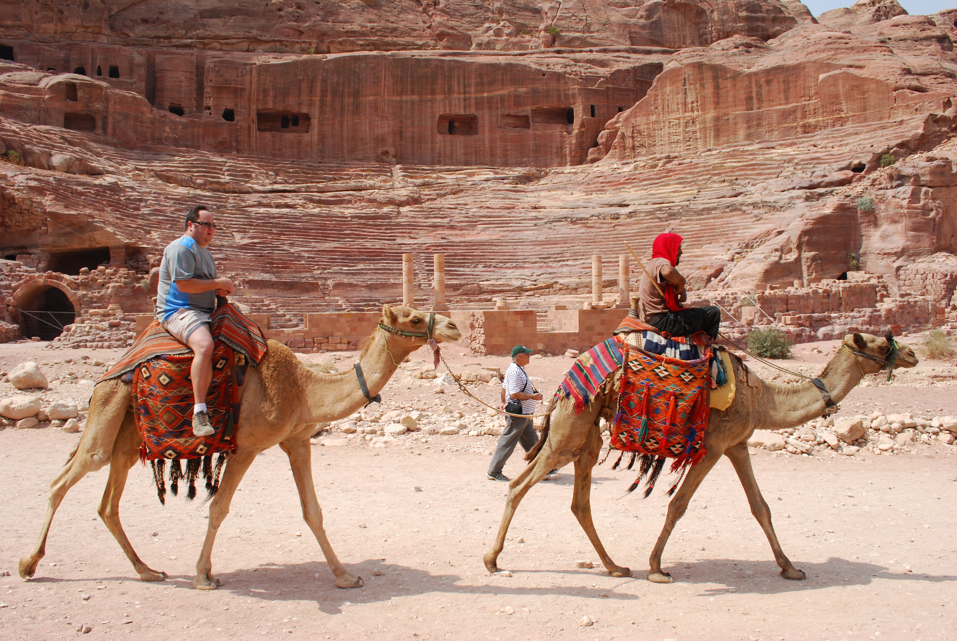 Dromadaires devant le théâtre de Pétra.